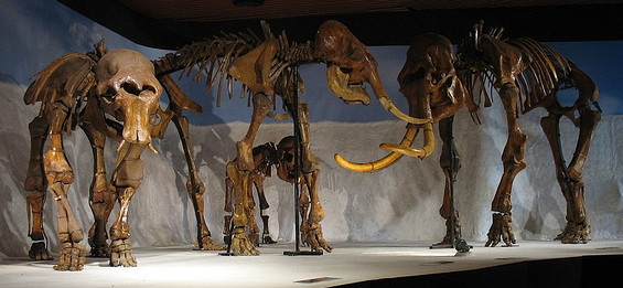 Il tesoro paleontologico della Russia